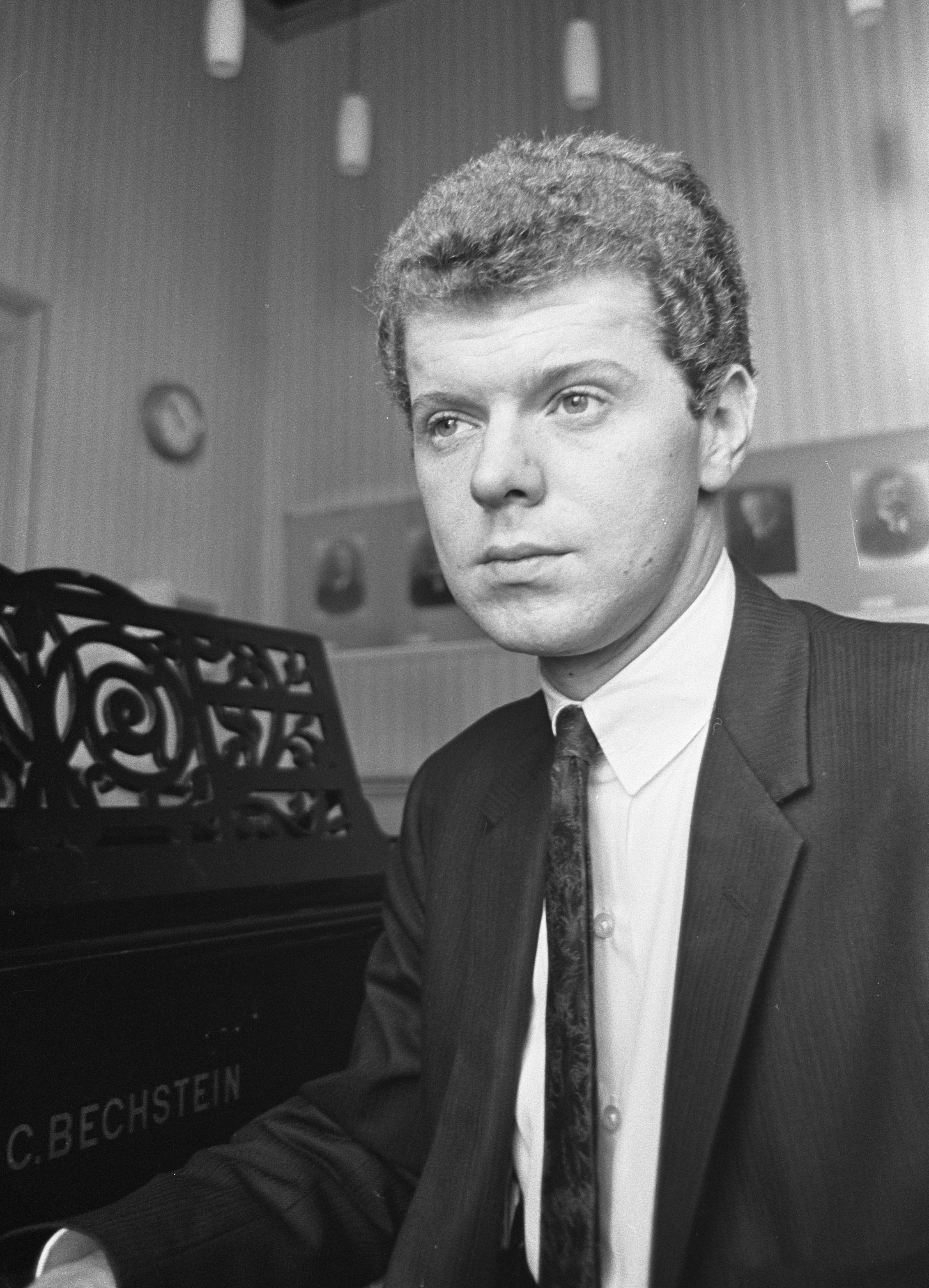 De Amerikaanse concert-pianist Harvey Lavan Van Cliburn repeteert in het Concertgebouw te Amsterdam voor zijn optreden tijdens het Grand Gala du Disque, 1966.